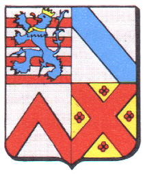 Wapen Koolkerke